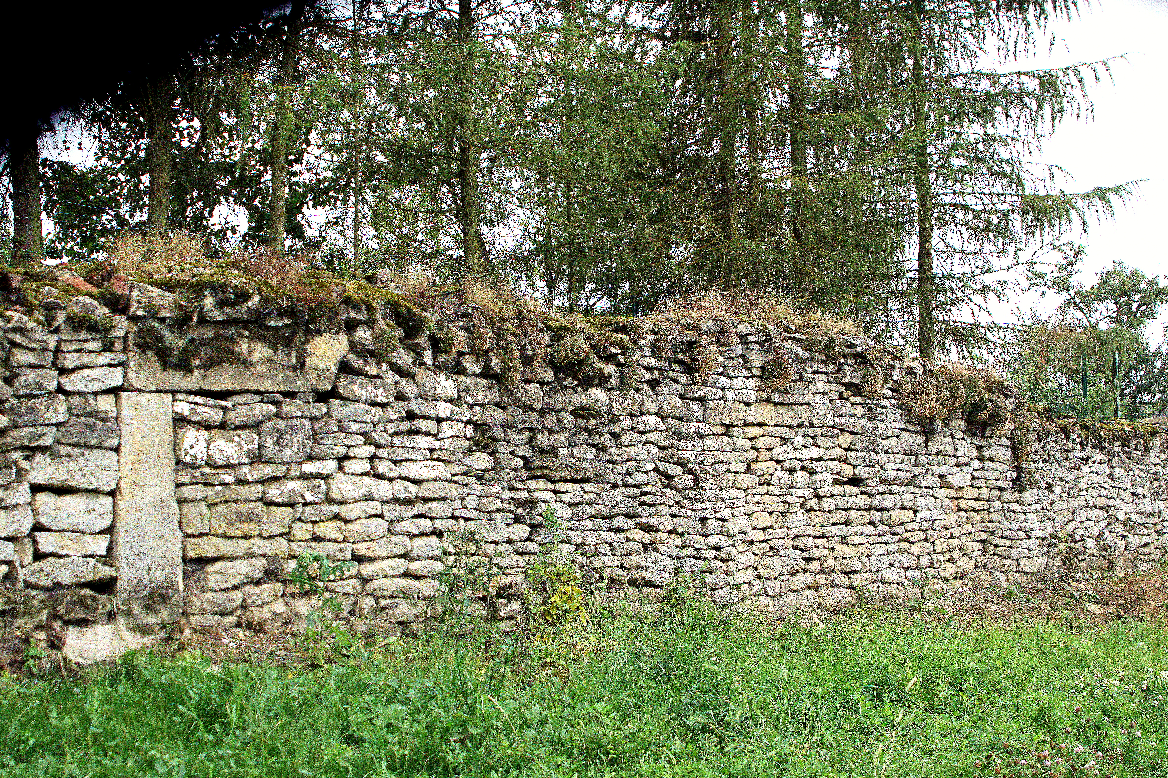 Dréchemauer zu Amel-sur-l'Étang am Depatement Meuse